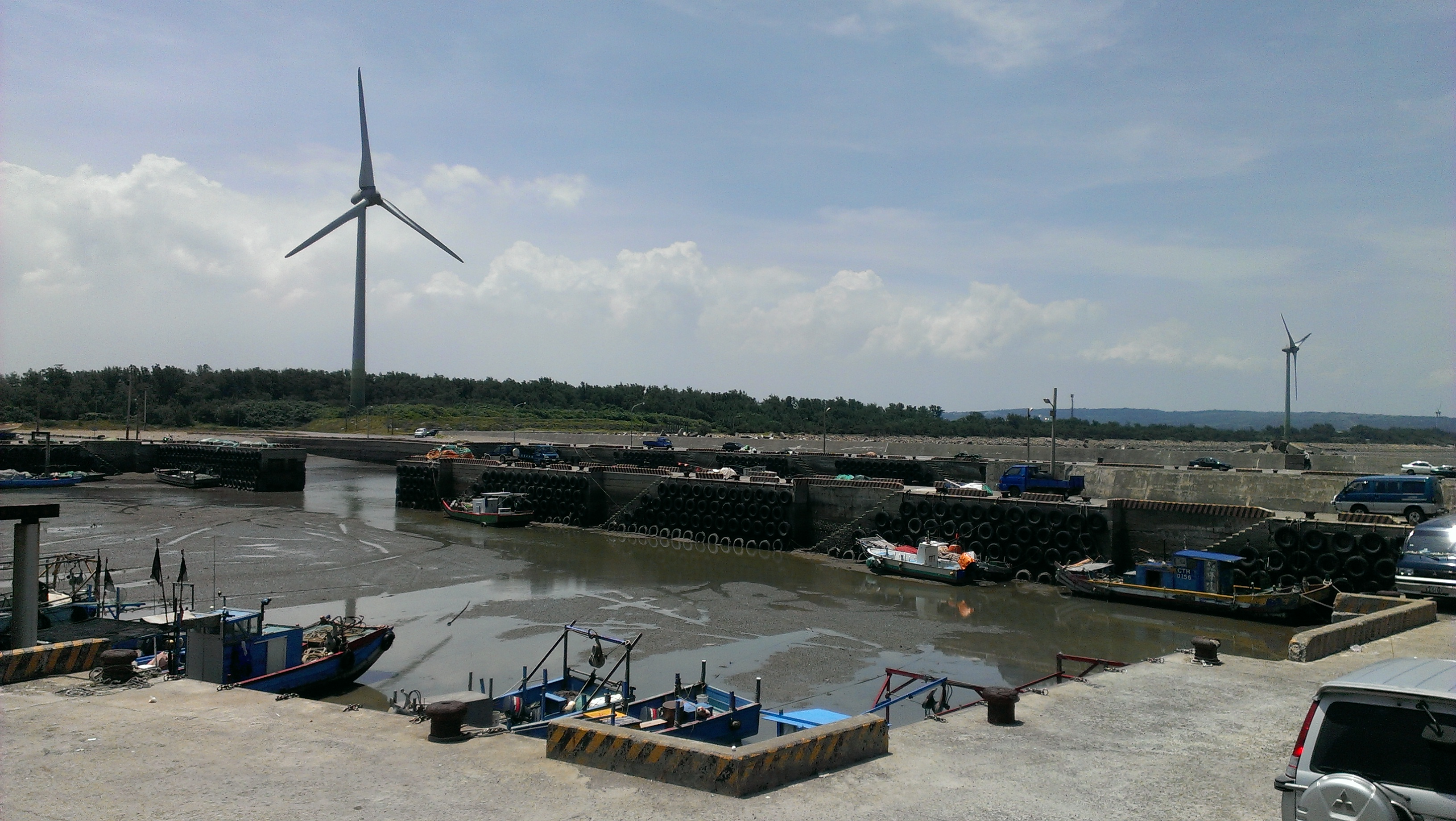 中文（台灣）: 坡頭漁港一景